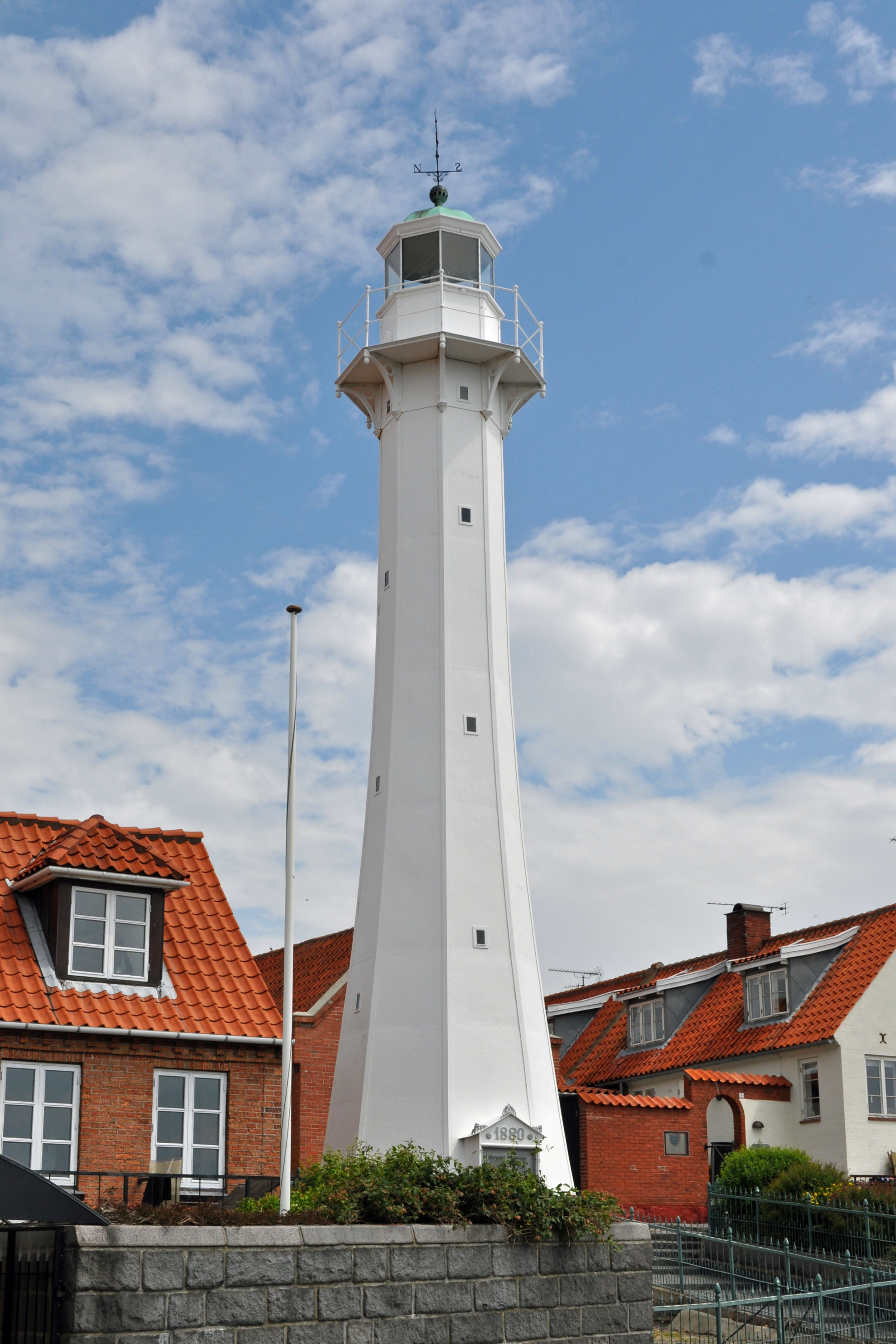 Rønne, Bornholm (2012-07-03), by Klugschnacker in Wikipedia (4)